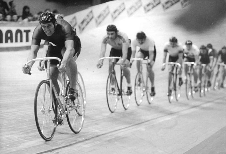 Werner Otto ADN-ZB Oberst 7.1.89 Berlin: Solidaritätsrennen auf der Winterbahn - Ehemalige Prominente des Radsports beteiligten sich am Wochenende an einer Sonderveranstaltung auf der Berliner Winterbahn der Werner-Seelenbinder-Halle, deren Erlös auf das Solidaritätskonto zugunsten der Erdbebenopfer in Armenien überwiesen wird. Werner Otto, ehemaliger Weltmeister im Tandem mit Jürgen Geschke führt hier das FEld über 20 TEmporunden an. Werner Otto ist heute Trainer beim SC Dynamo Berlin.